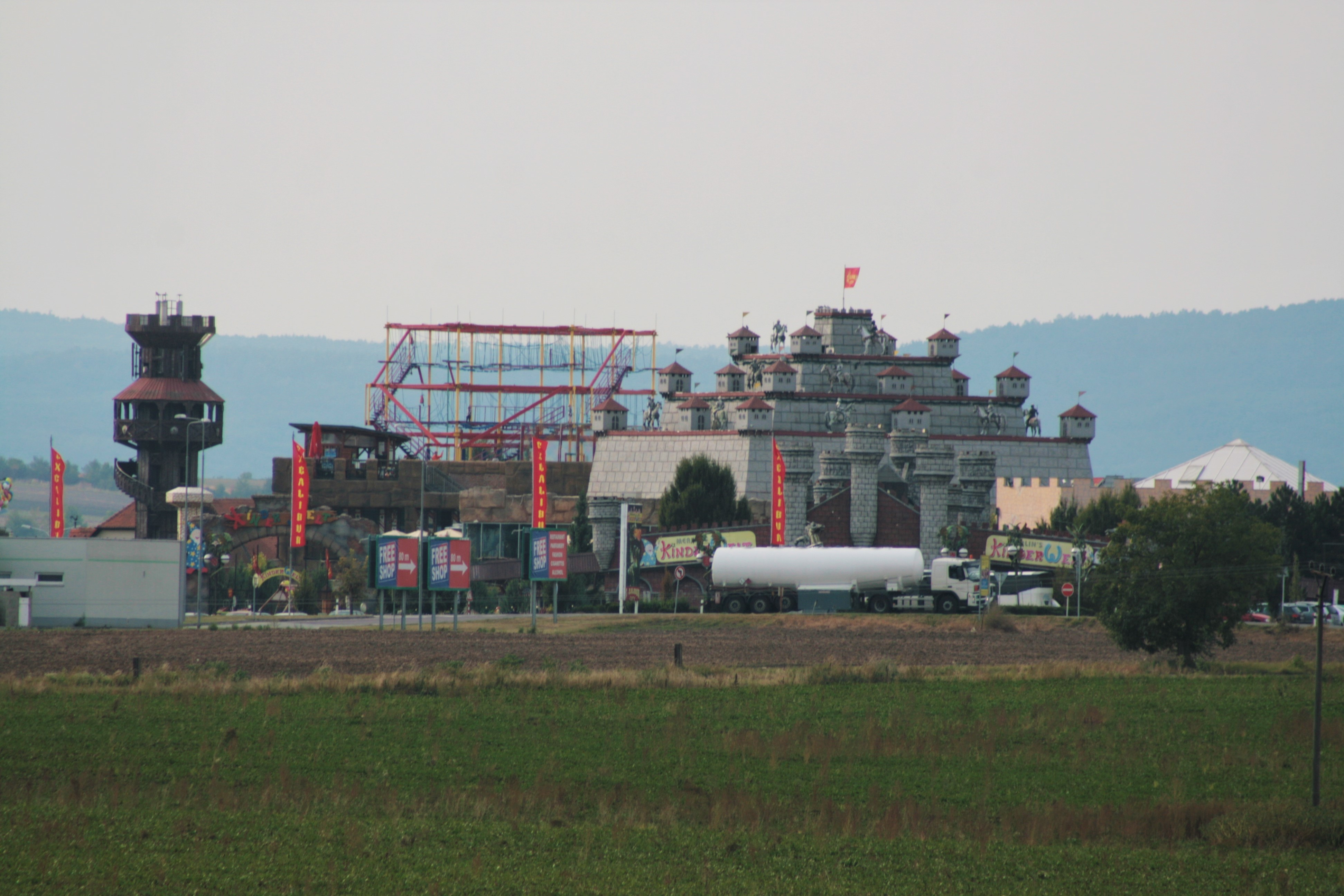 Zaniklá vesnice Hatě, část obce Chvalovice v okrese Znojmo. Příhraniční zábavní a nákupní centrum Excalibur City. Celkový pohled na Merlinův dětský svět od východu.